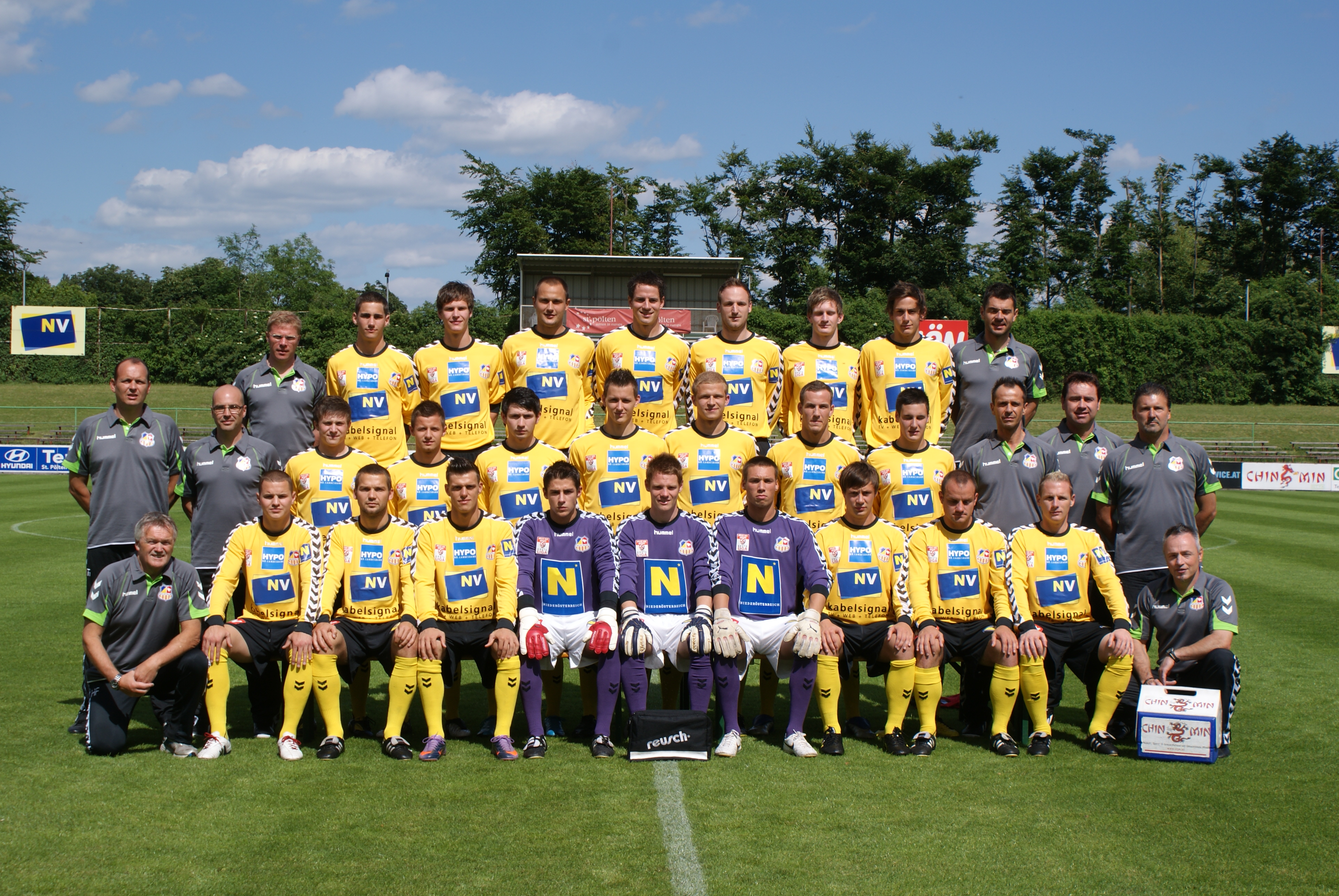 Mannschaftsfoto des SKNV St. Pölten. Jeweils von links nach rechts: Hinten: Co-Trainer Michael Schadinger, Michael Ambichl, Georg Gravogl, Michael Wojtanowicz, Andreas Gradinger, Arno Kozelsky, Florian Zellhofer, Lukas Thürauer, Athletic-Trainer Christoph Reisinger. Mitte: Trainer Martin Scherb, Co-Trainer Hannes Spilka, Christoph Ertl, Peter Brandl, Mirnes Becirovic, Stefan Zwierschitz, Michael Popp, Bernhard Kotinsky, Jannick Schibany, Teammanager Thomas Haiderer, Sportmanager Christoph Brunnauer, Tormanntrainer Ernst Scherr. Vorne: Masseur Johann Fehringer, Jiri Lenko, Manuel Rödl, Vait Ismaili, Markus Posch, Thomas Vollnhofer, Christoph Riegler, Robert Gruberbauer, Markus Speiser, Jochen Fallmann, Masseur Werner Pawaronschütz.